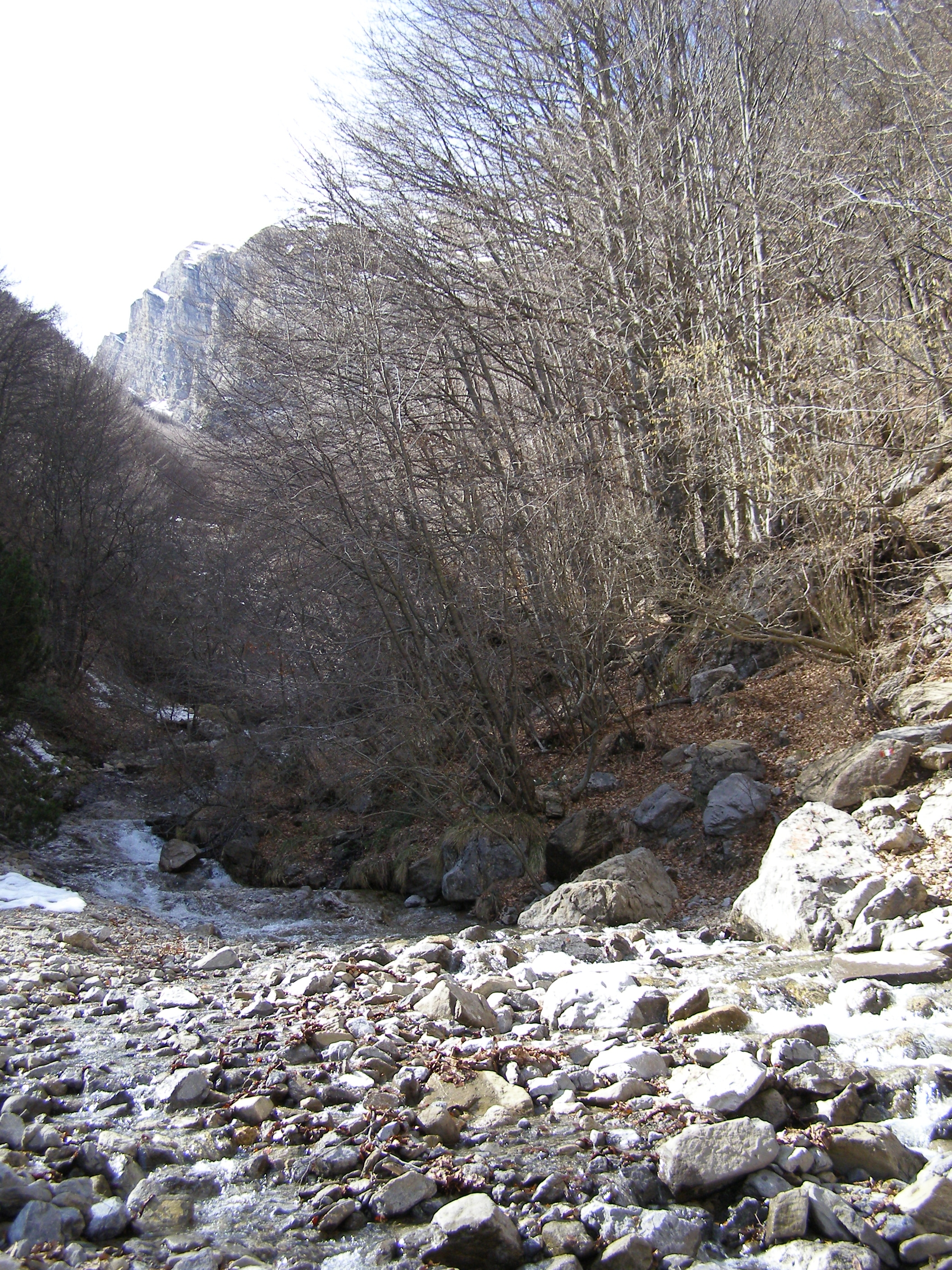 Fiume Pioverna